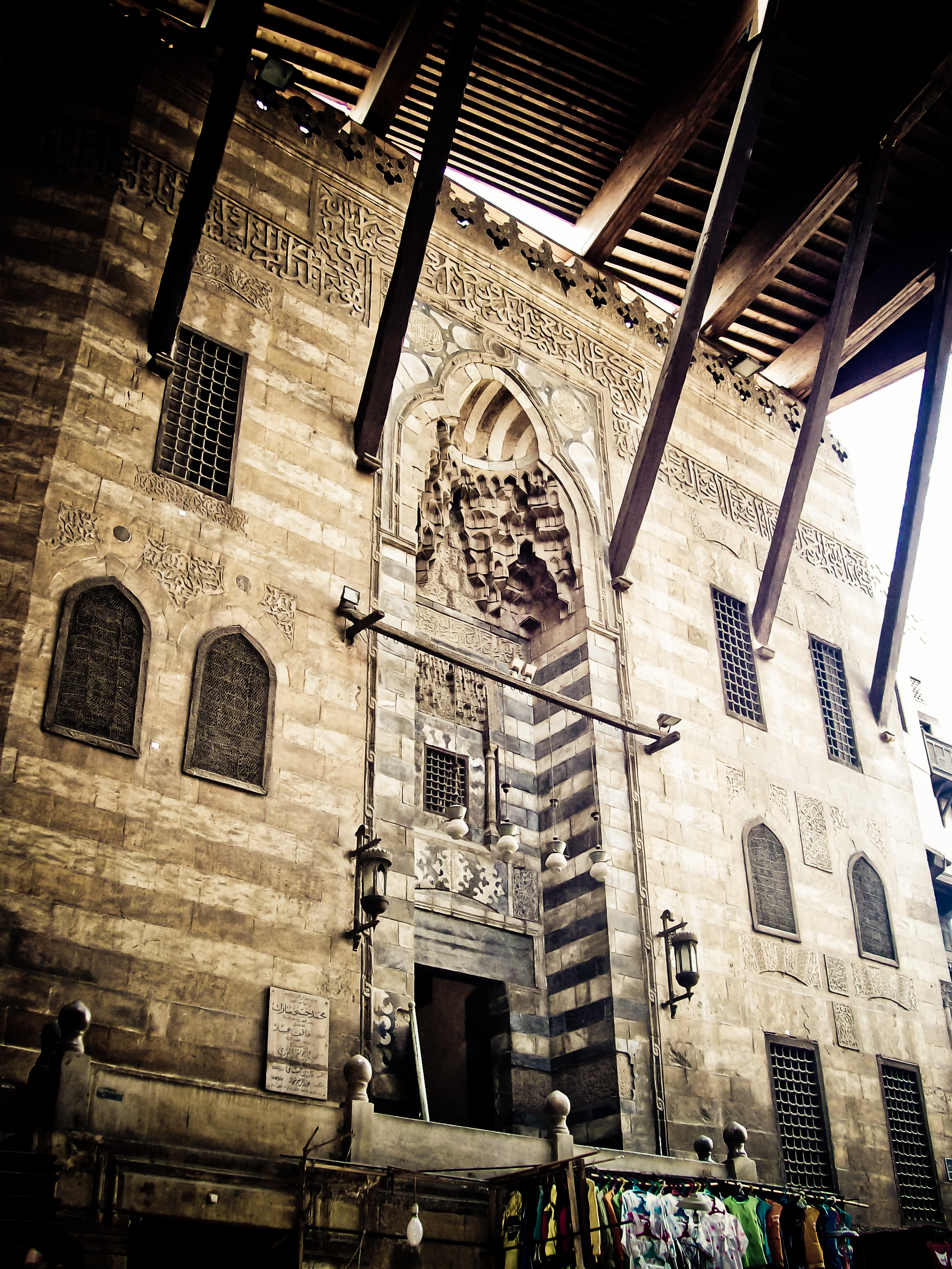 مسجد السلطان الغوري - القاهرة الفاطمية هو واجهة المسجد الموجود بشارع المعز لدين الله الفاطمي